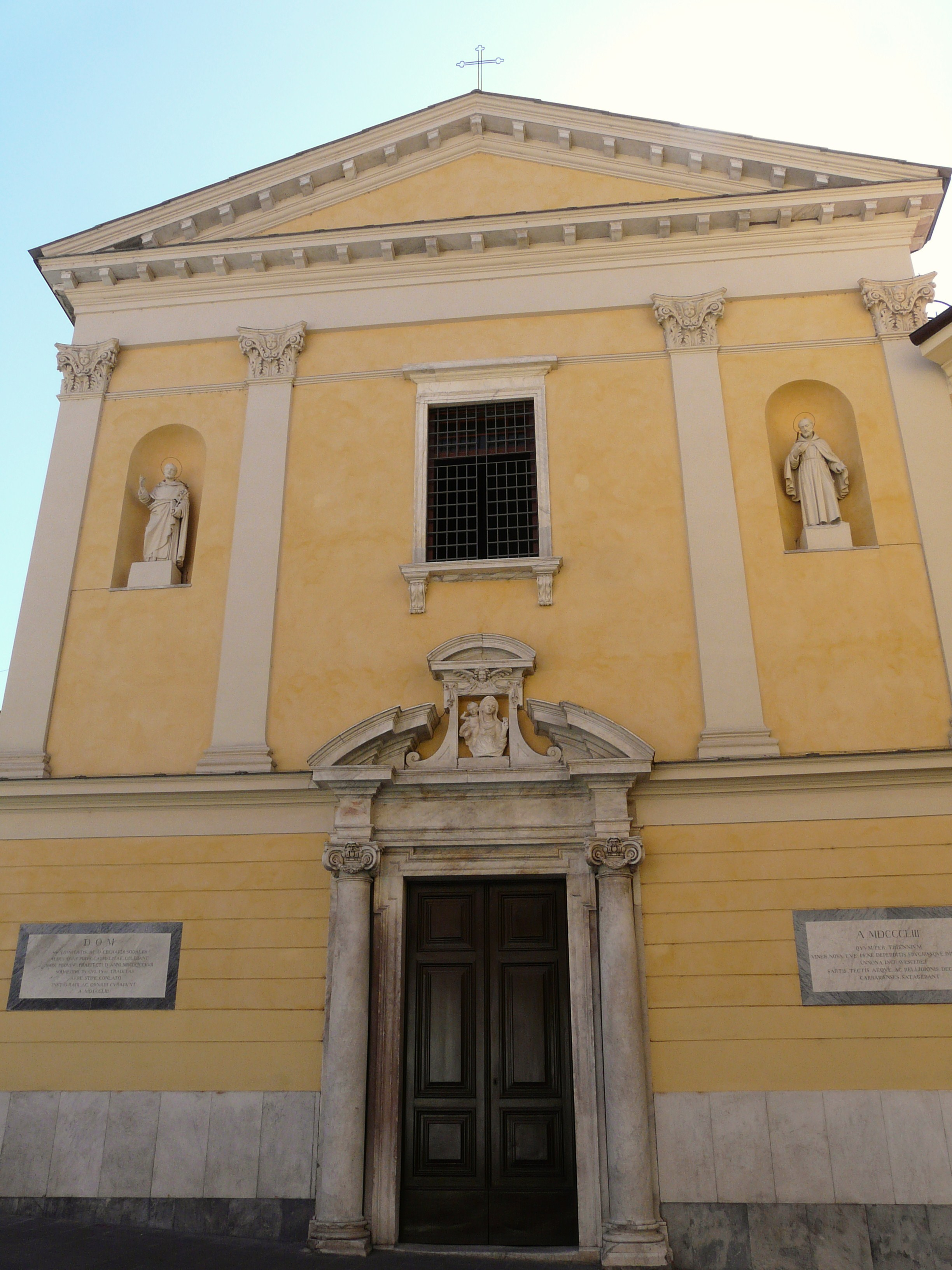 Chiesa della Madonna del Carmine di Carrara, Toscana, Italia